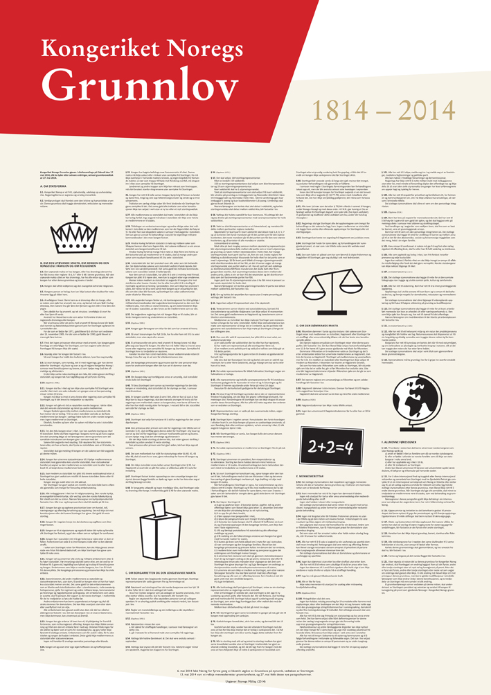 Plakat med Kongeriket Noregs Grunnlov